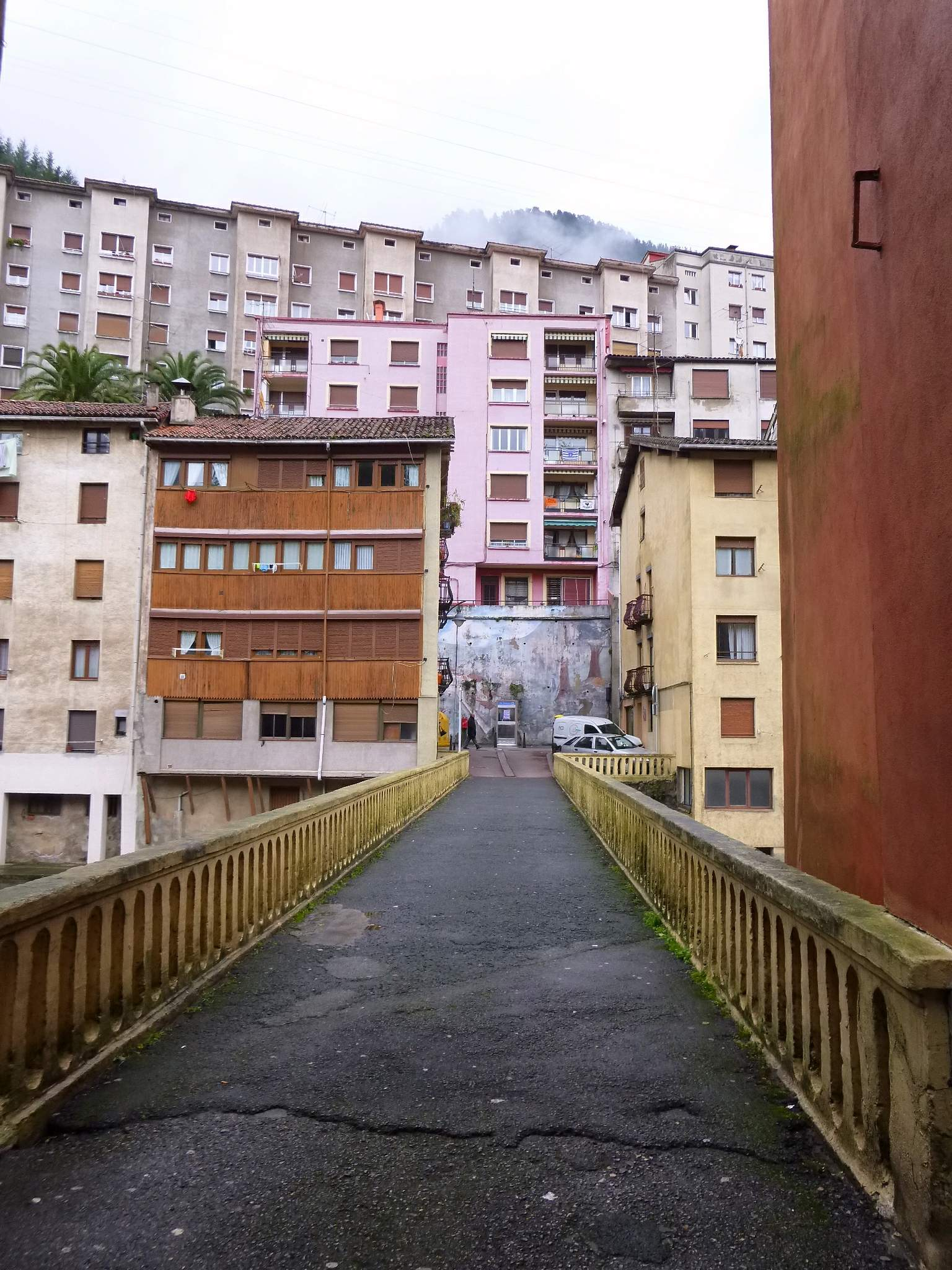 Soraluze (Gipúzkoa)